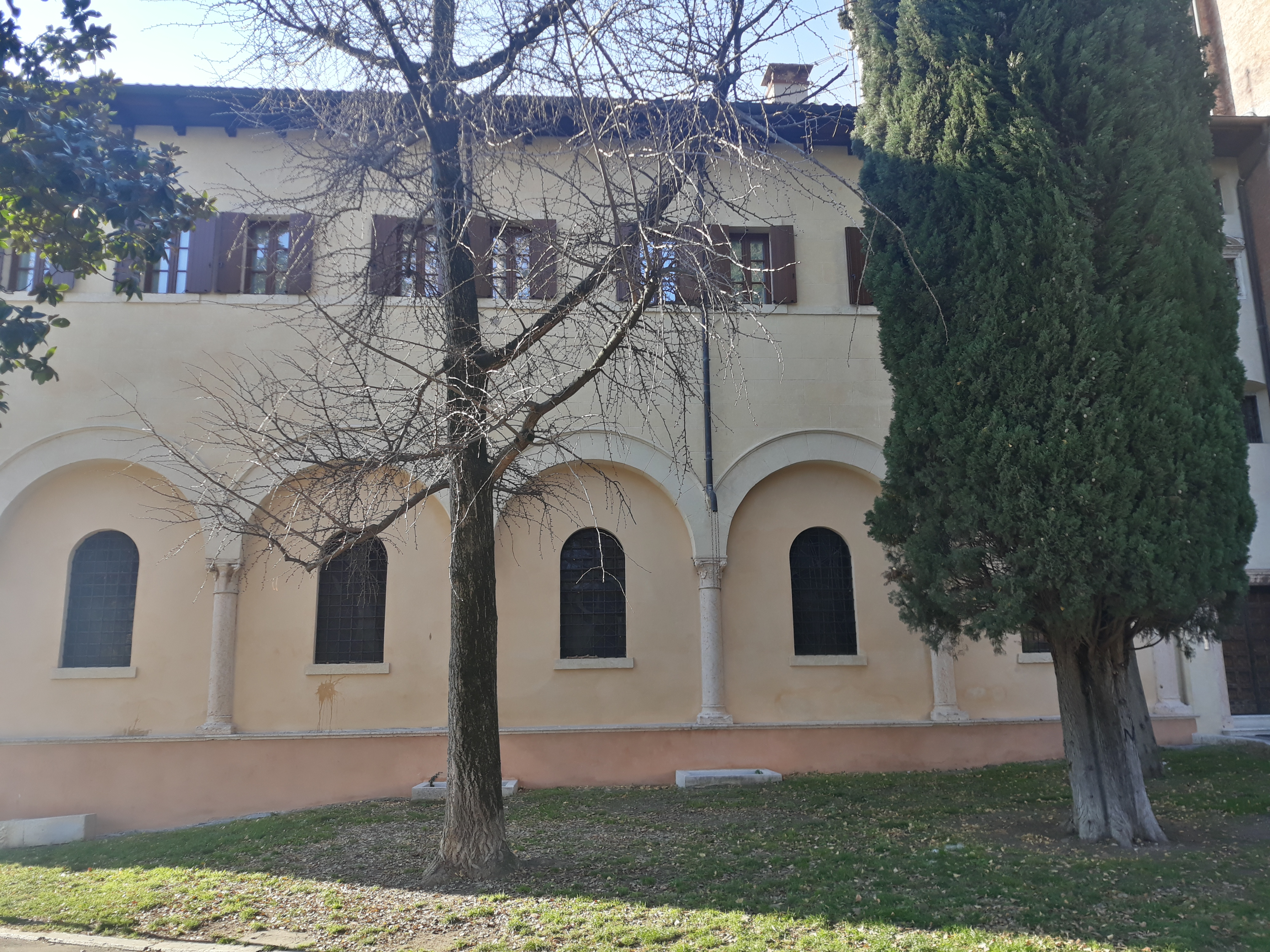 Chiosto quattrocentesco (resti) di san Giorgio in Braida